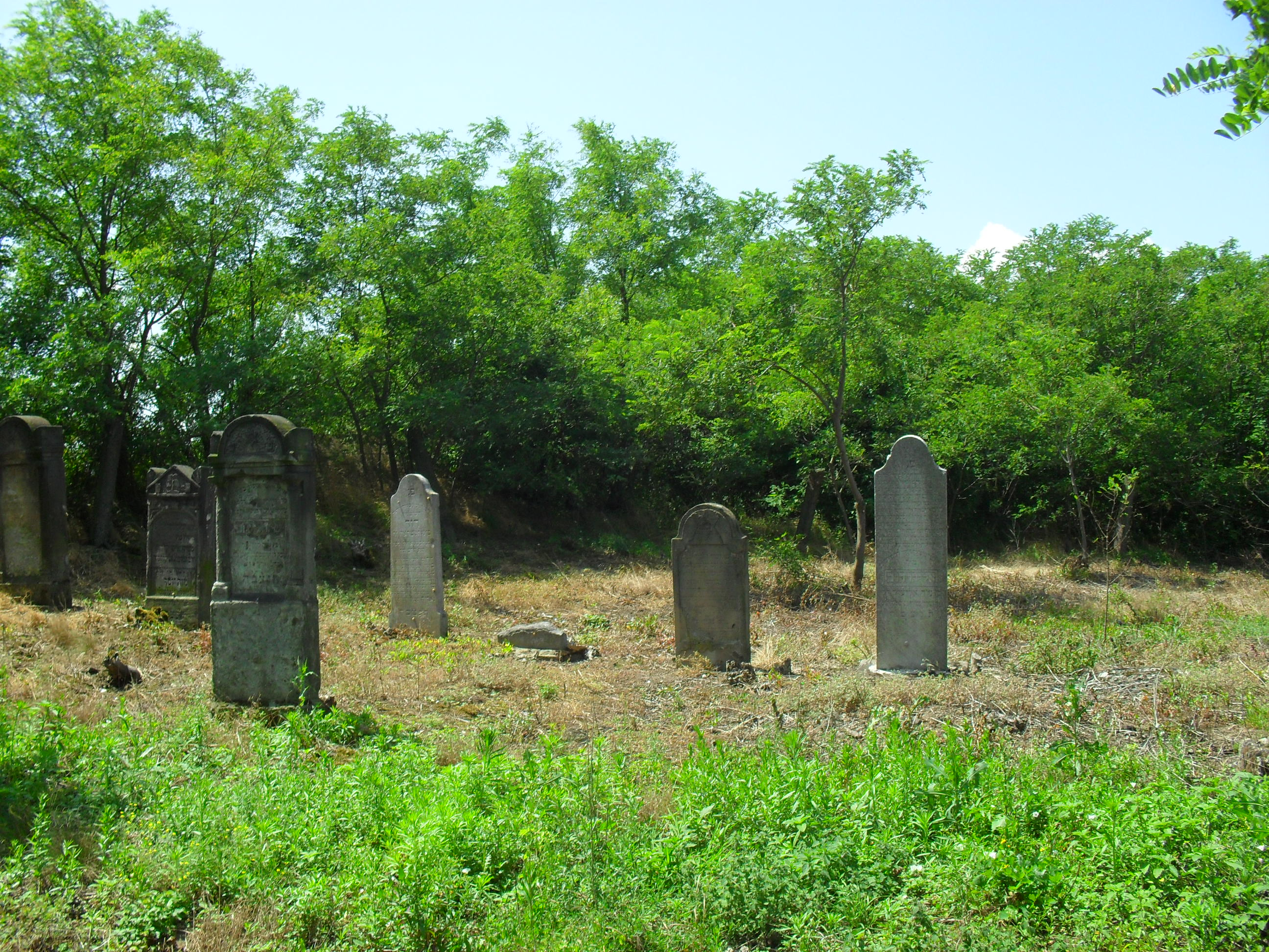 Szomotor - zsidó temető